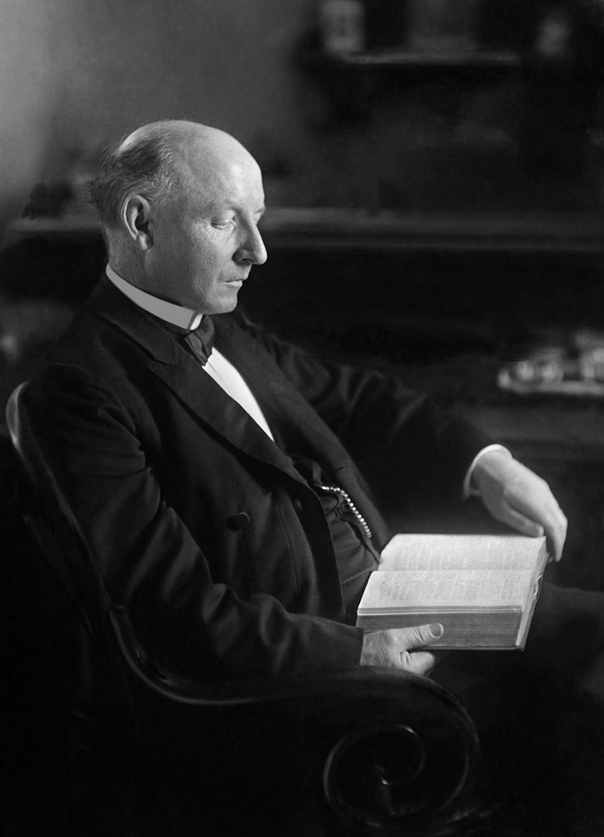 Carl Paul (1857-1927) war deutscher Pfarrer in Rothschönberg und Lorenzkirch, Missionsdirektor des Leipziger Missionswerkes und Honorarprofessor für neuere Missionsgeschichte und Missionskunde der Universität Leipzig. Das Bild zeigt ihn 1911 im Pfarrhaus von Lorenzkirch beim Lesen der Bibel.